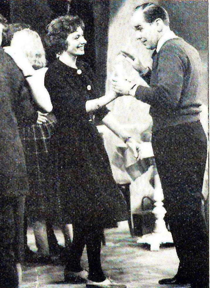 Vi ungas pianist Charlie Norman dansar med programledaren Karin Falck (dåvarande Sohlman.